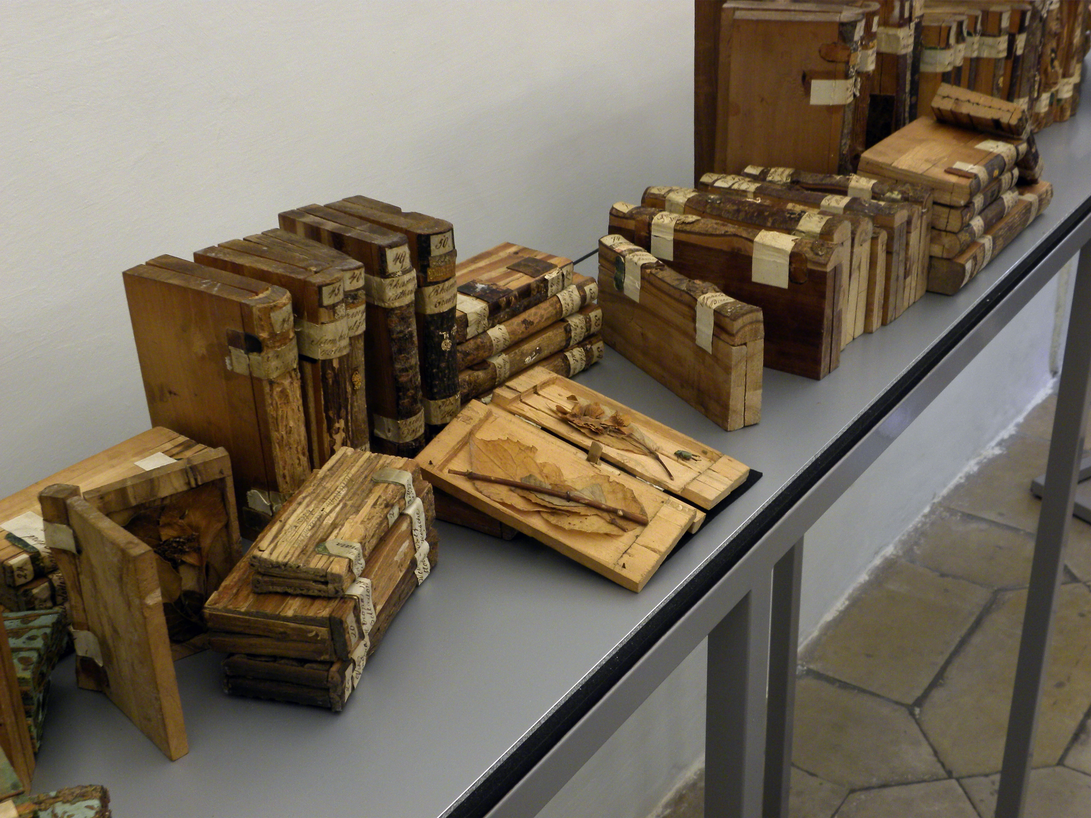 Die Xylothek in der Bibliothek des Stiftes Lilienfeld